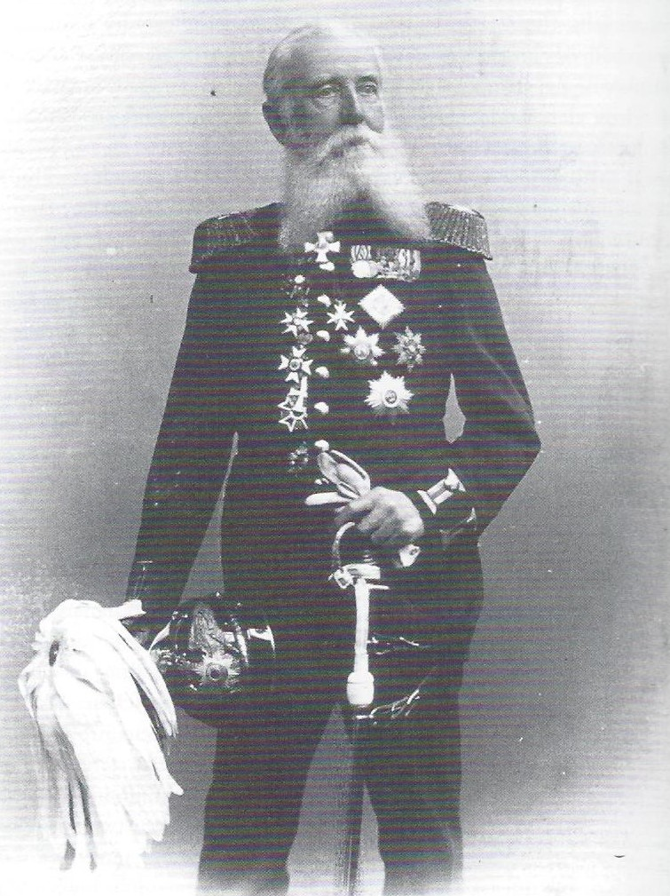 Friedrich von Esmarch als Generalarzt der Preußischen Armee